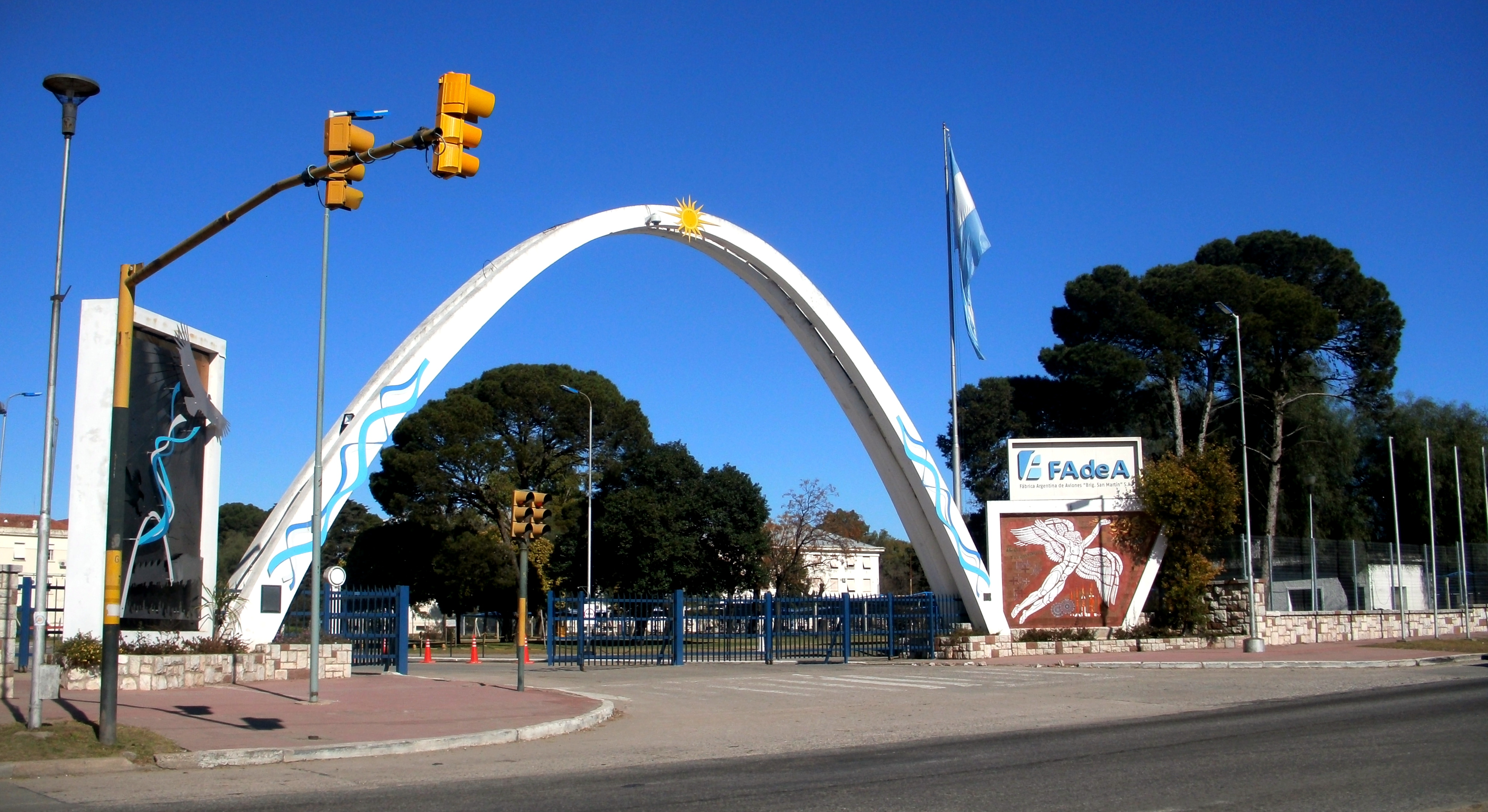 Ingreso a la fábrica